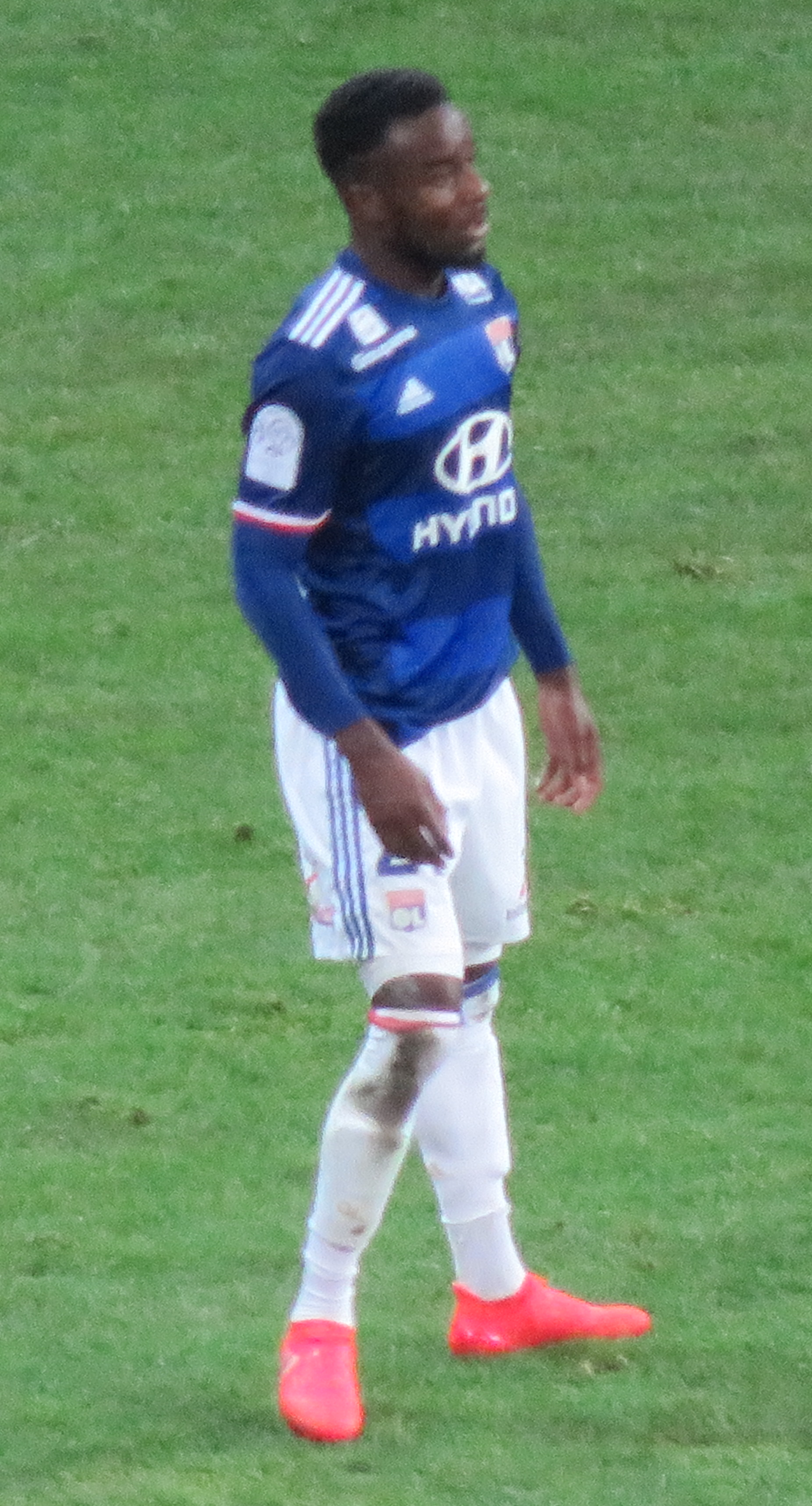 Maxwel Cornet lors de la deuxième mi-temps du match entre Lille et Lyon le 18 novembre 2016